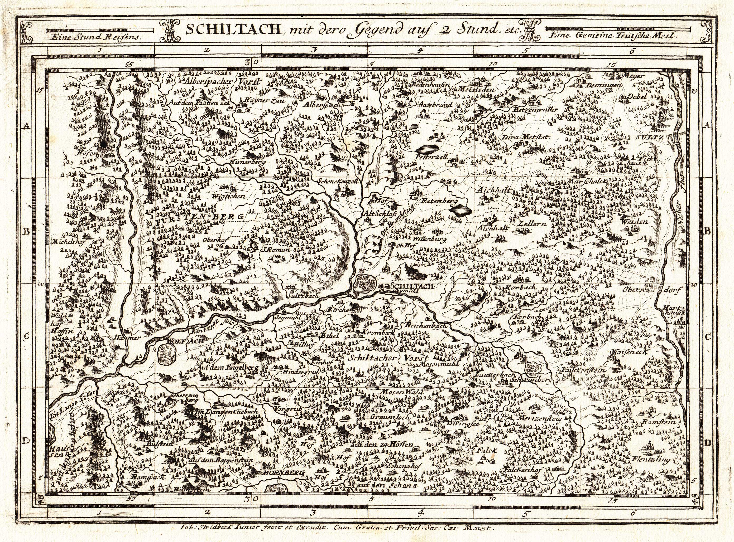 Karte Schiltach, mit dero Gegend auf 2 Stund etc. aus Atlas Curieux oder Neuer und Compendieuser Atlas [..…], herausgegeben und verlegt von Gabriel Bodenehr, Augsburg ca. 1716. Sie zeigt das Obere Kinzigtal im Schwarzwald. Bodenehrs Karte hatte vor allem den Zweck, Reisenden eine ungefähre Vorstellung über Entfernungsangaben zu machen. Daher ist der Kupferstich seines Mitarbeiters Stridbeck junior (siehe lateinischer Urheberhinweis im unteren Teil der Karte) für unser heutiges Verständnis auch nicht sehr exakt und enthält Fehler. Auch ältere Karten des Gebietes sind weit genauer. So wurde beispielsweise die Wolf am linken Bildrand mit dem Harmersbach ("Hamer") verwechselt, der sich in Wirklichkeit aber viel weiter westlich befindet.